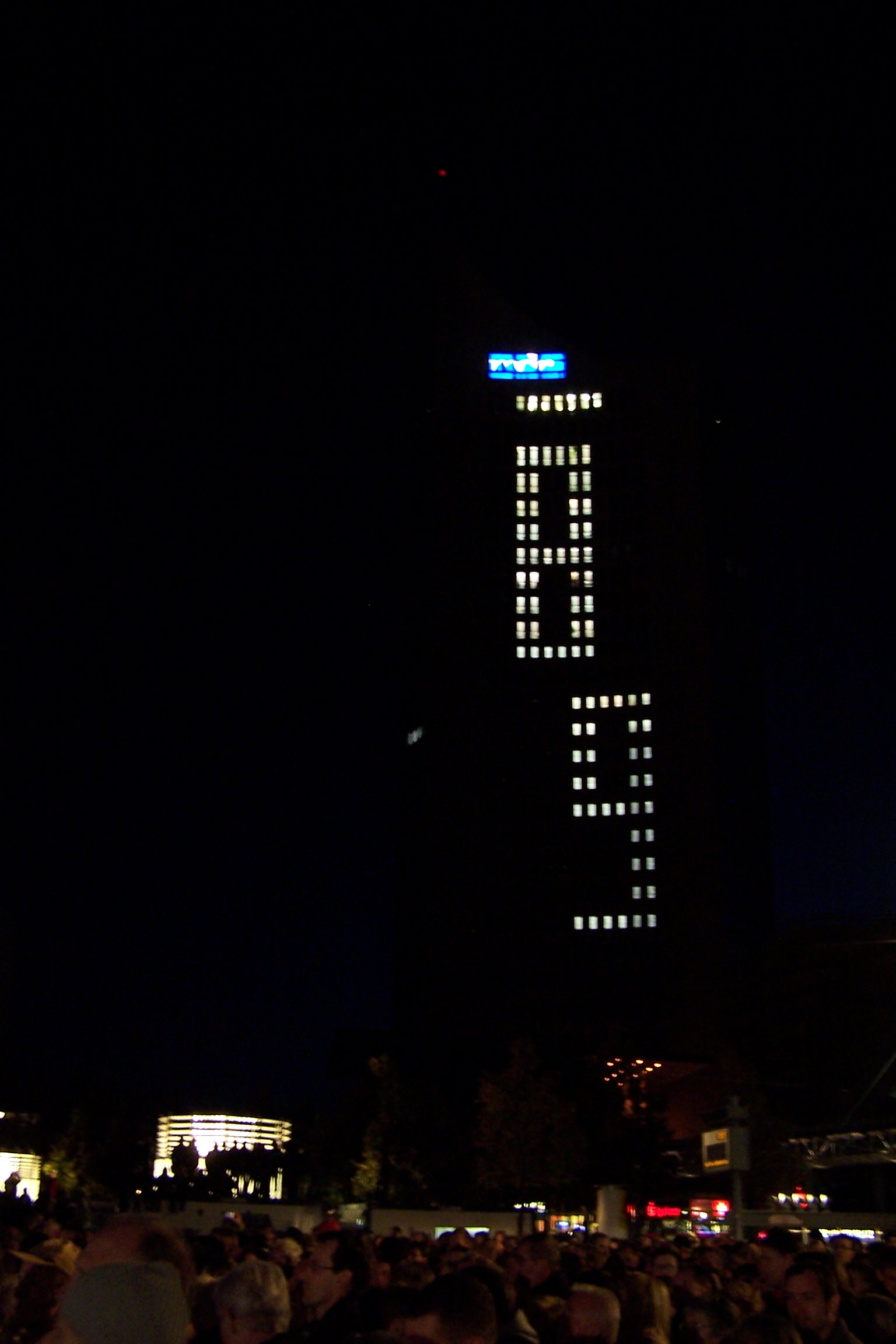 Lichtfest Leipzig 2009